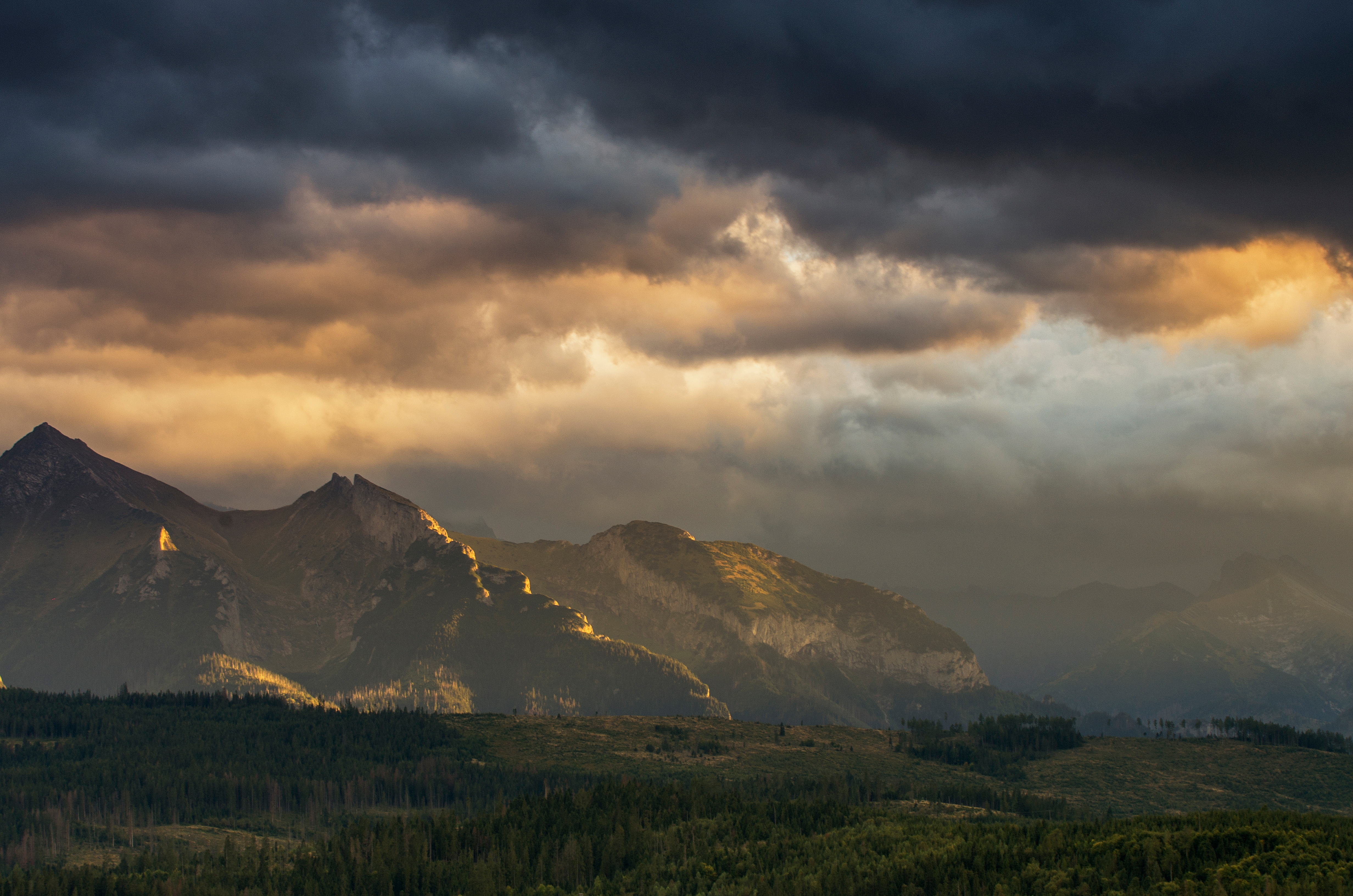 Park narodowy: Tatrzański Park Narodowy This is a photography of protected area with CRFOP ID PL.ZIPOP.1393.PN.14